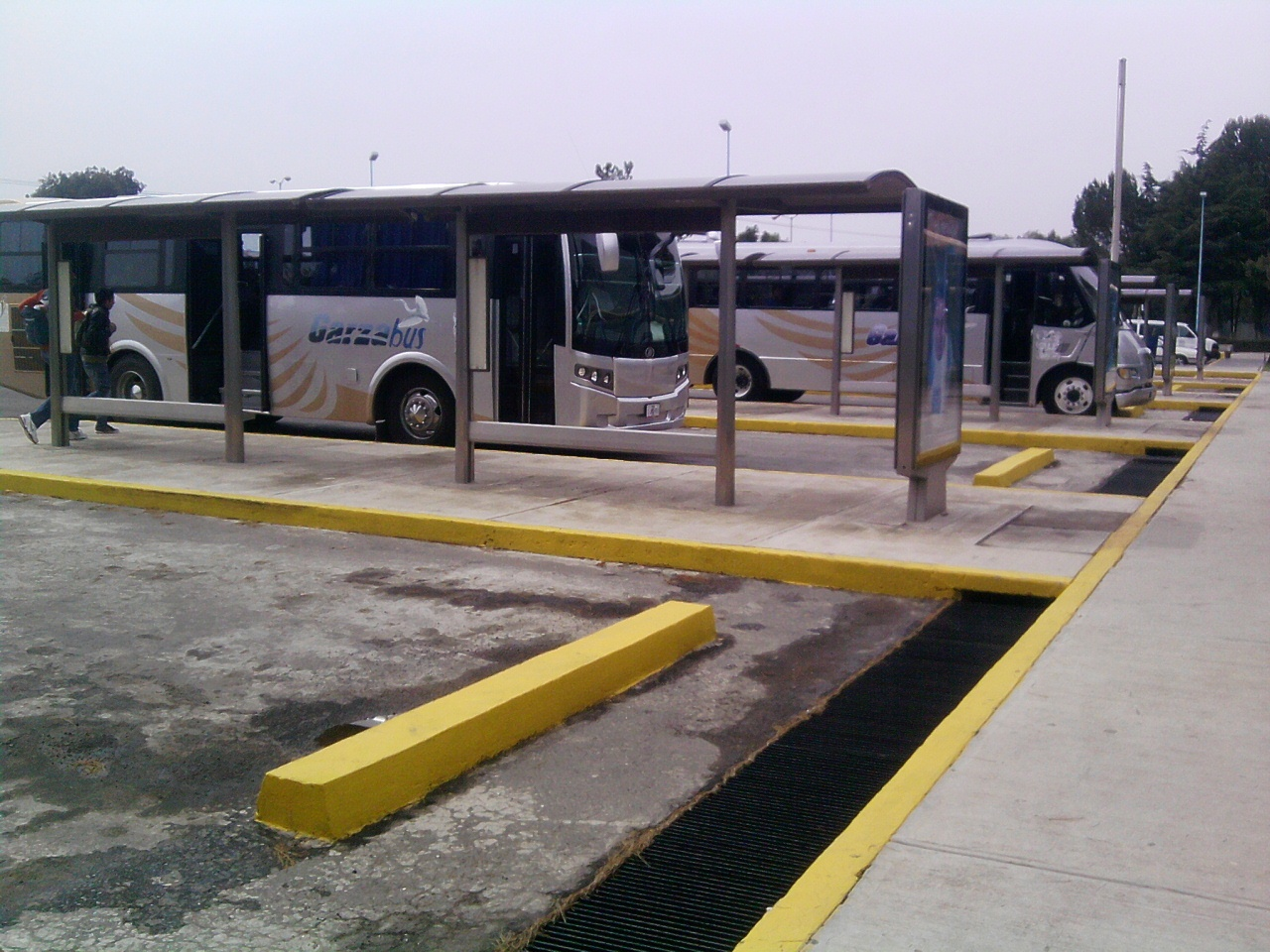 Garza-Bus, trasporte universitario de la UAEH de Pachuca, Hidalgo, México.